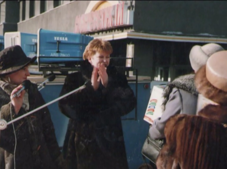 Chi-Chewa: Н.А.Сысоева, общественная деятельность